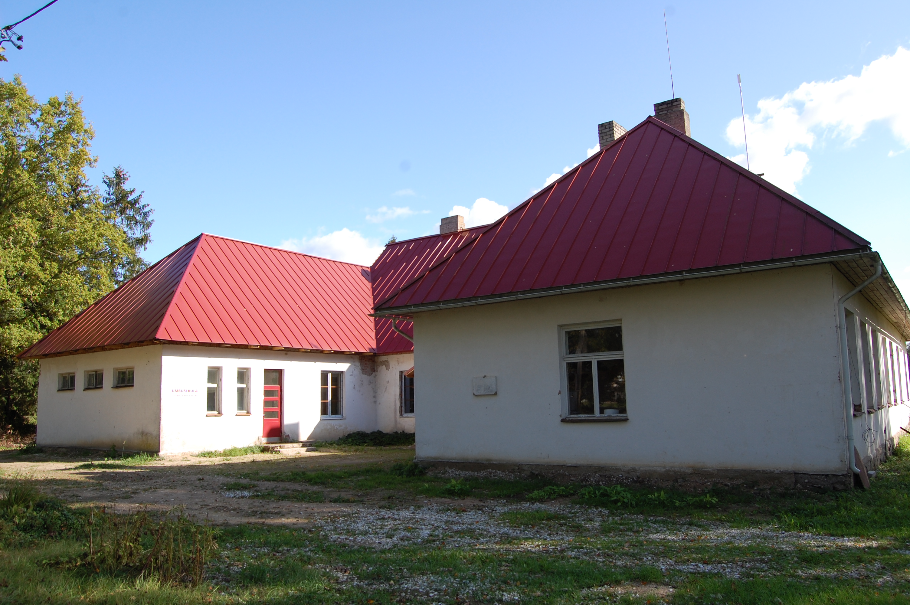 Umbusi külaseltsi maja Põltsamaa vallas 2019. aasta septembris